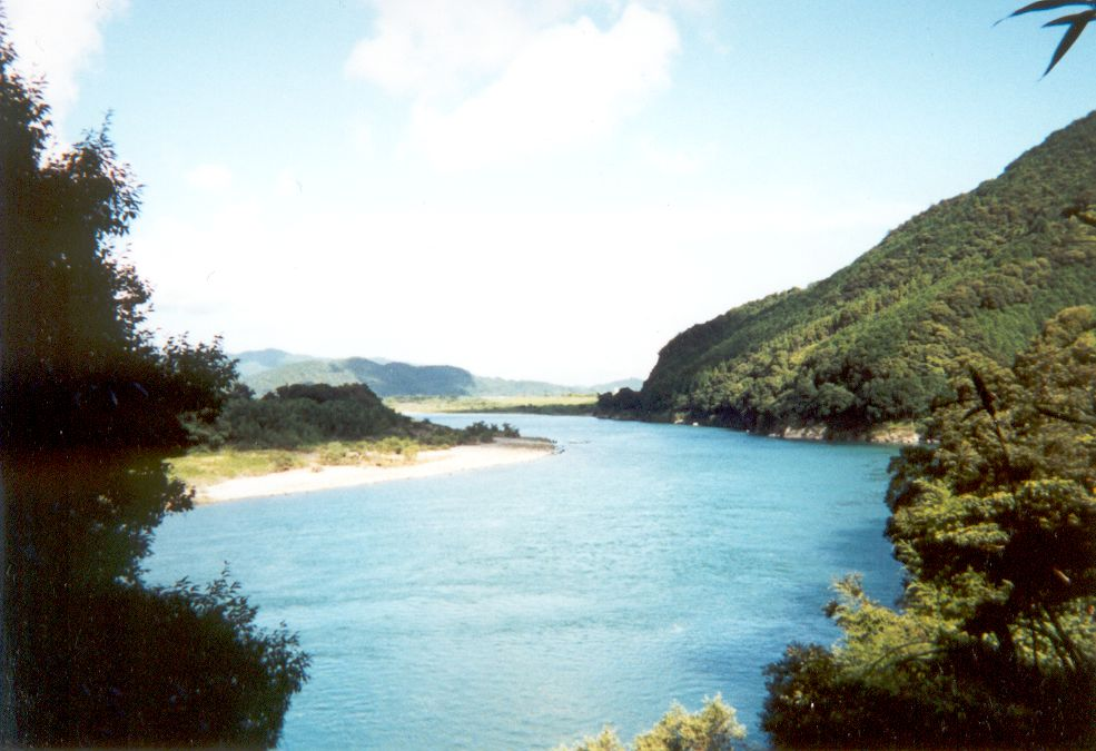 Beschreibung: Der Shimanto-Fluss (四万十川 shimantogawa) im August 2000 in der Nähe von Nakamura (中村), Kōchi-Präfektur, Shikoku, Japan Quelle: Foto, gescant von Hokanomono Fotograf: persönlich bekannt, möchte ungenannt bleiben Andere Versionen: derzeit keine